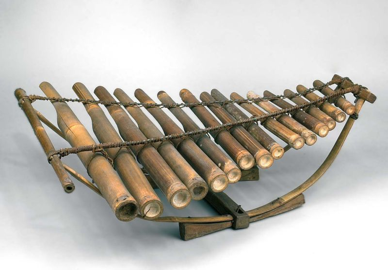 Slaginstrument. Xylofoon van bamboe met vijftien toetsen, onderdeel van tjalung-ensemble Unknown language: Penitir